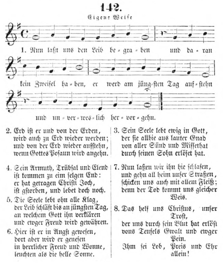 Nun lasst uns den Leib begraben, Deutsches Evangelisches Kirchen-Gesangbuch 1854